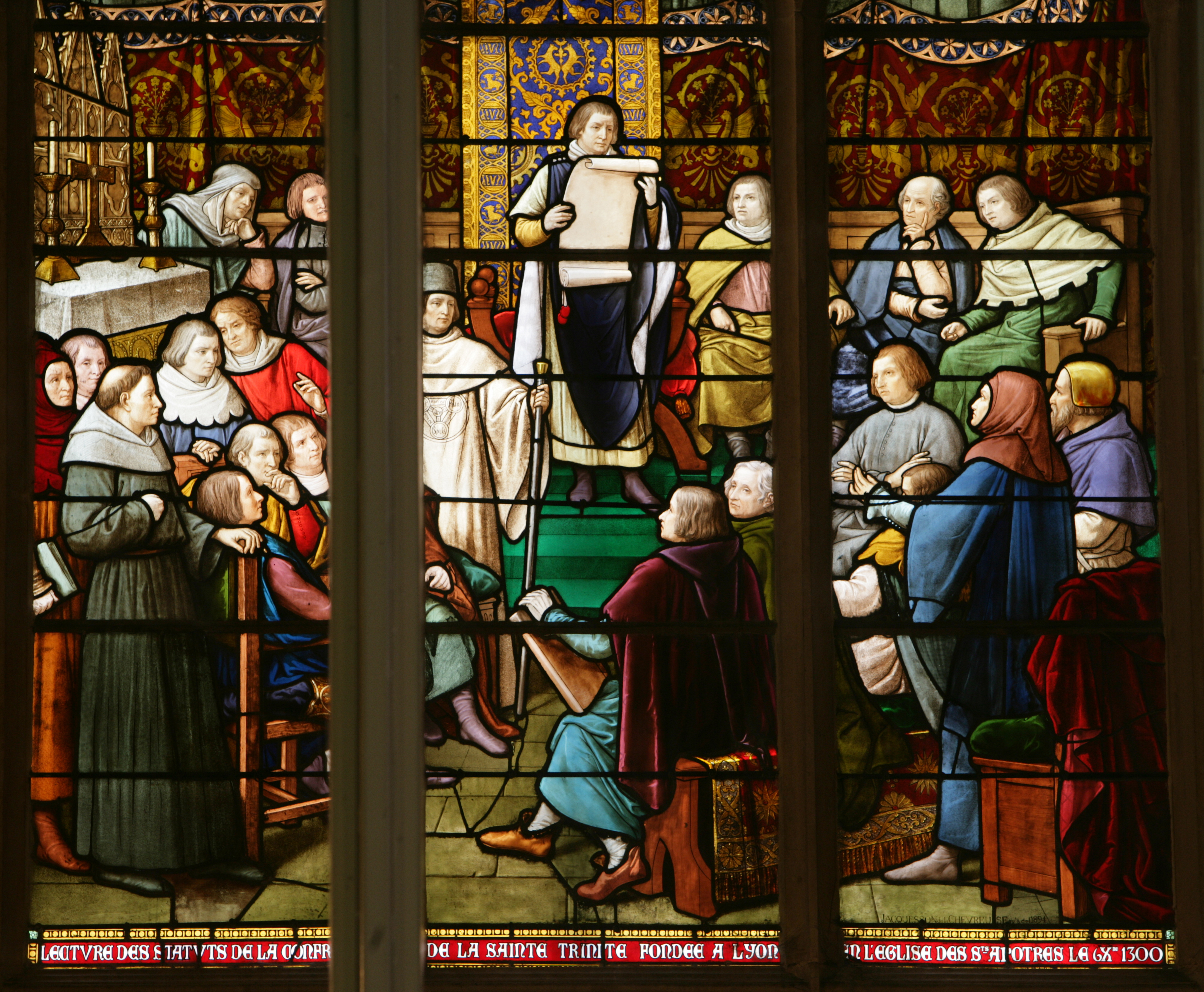 Eglise Saint Nizier à Lyon. Lecture des statuts de la confrérie